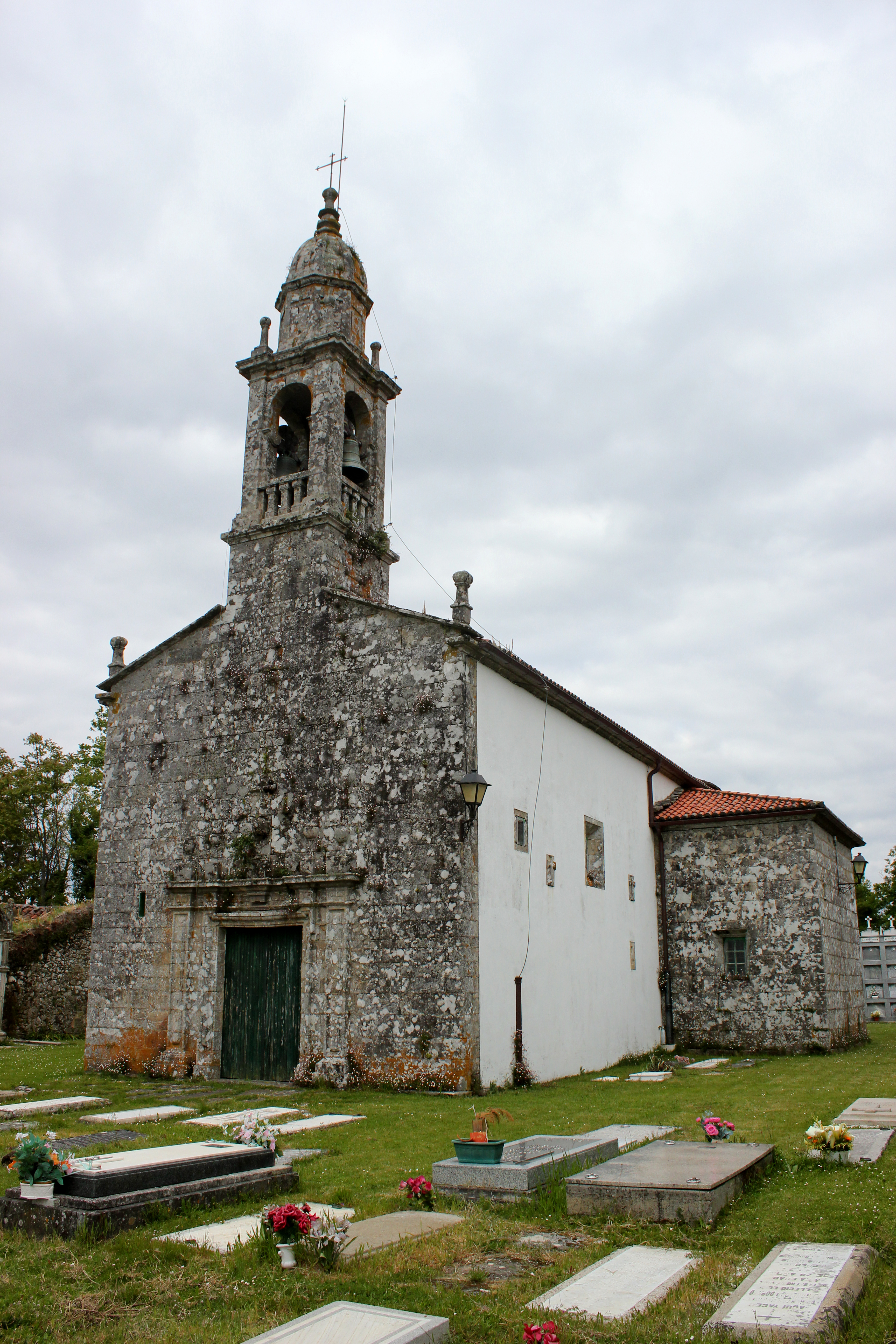 Igrexa de San Fins de Sales, Vedra.